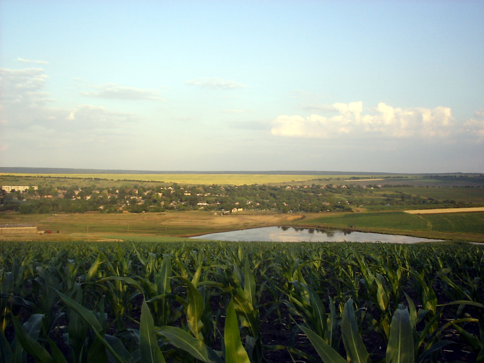 Vişniovca este o localitate-centru de comună în Raionul Cantemir, Republica Moldova.